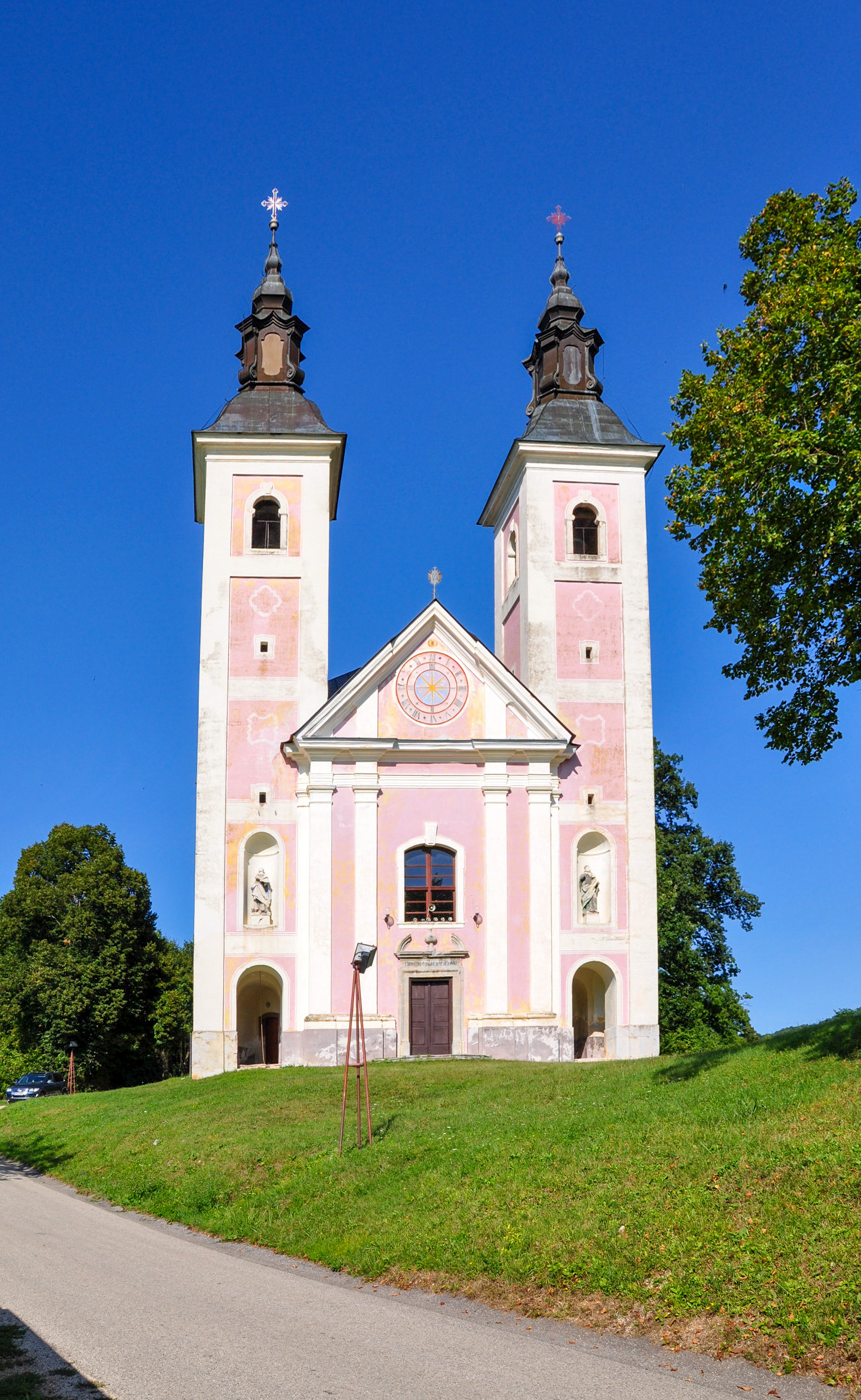 Globočice pri Kostanjevici - cerkev Matere dobrega sveta (pročelje)